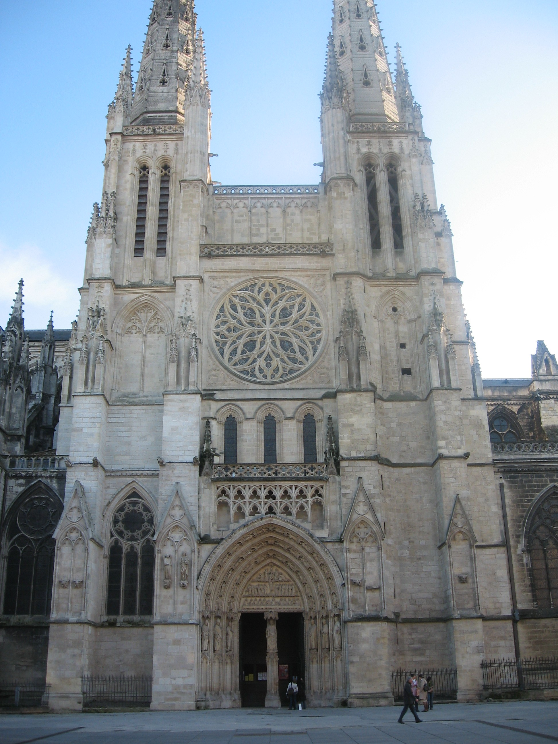 Entrée de la Cathédrale Saint-André de Bordeaux, France prise en photo par moi-même. Ajor933 00:27, 23 November 2006 (UTC)